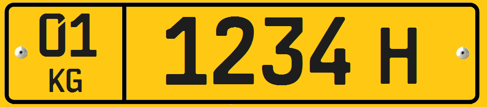 پلاک جدید جمهوری قرقیزستان